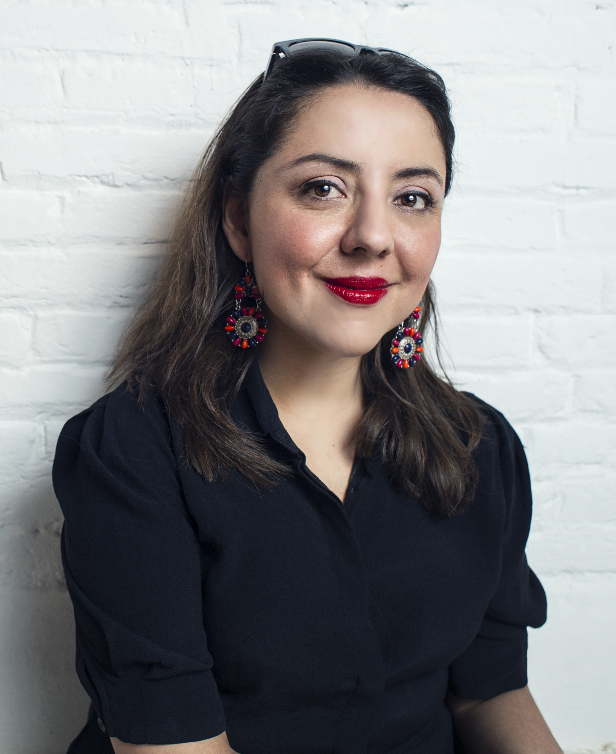 Renata AÌvila, abogada internacional de derechos humanos, en el Internet Freedom Festival. 2016. Foto de DANIEL DUART/Plaza.